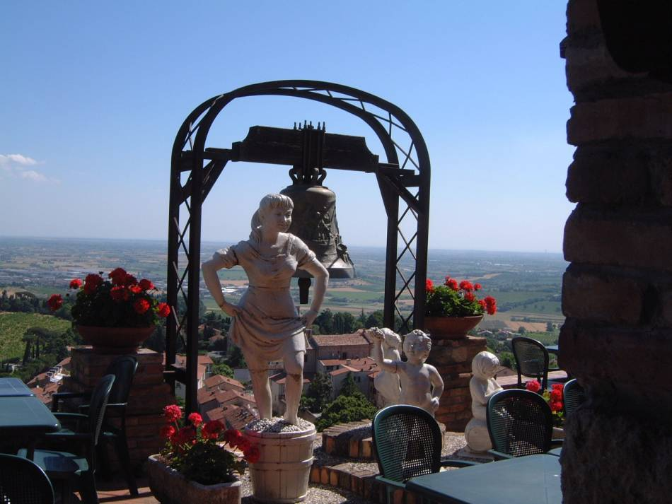 Photo de vacances. Vue de la vallée depuis Bertinoro Licensing Photo personnelle mise à la disposition de tous.